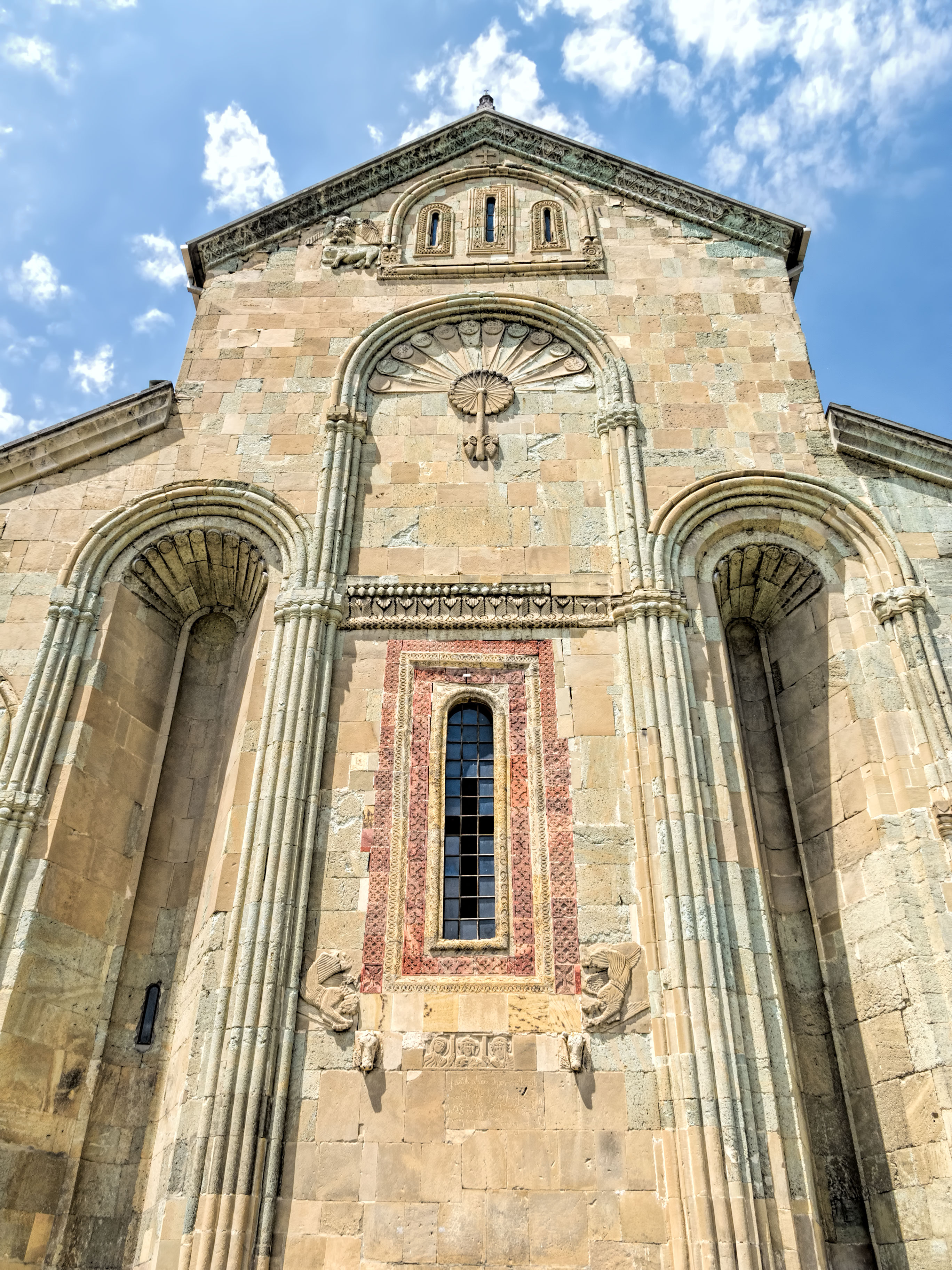 Svetitskhoveli Cathedral, Mtskheta, Georgia